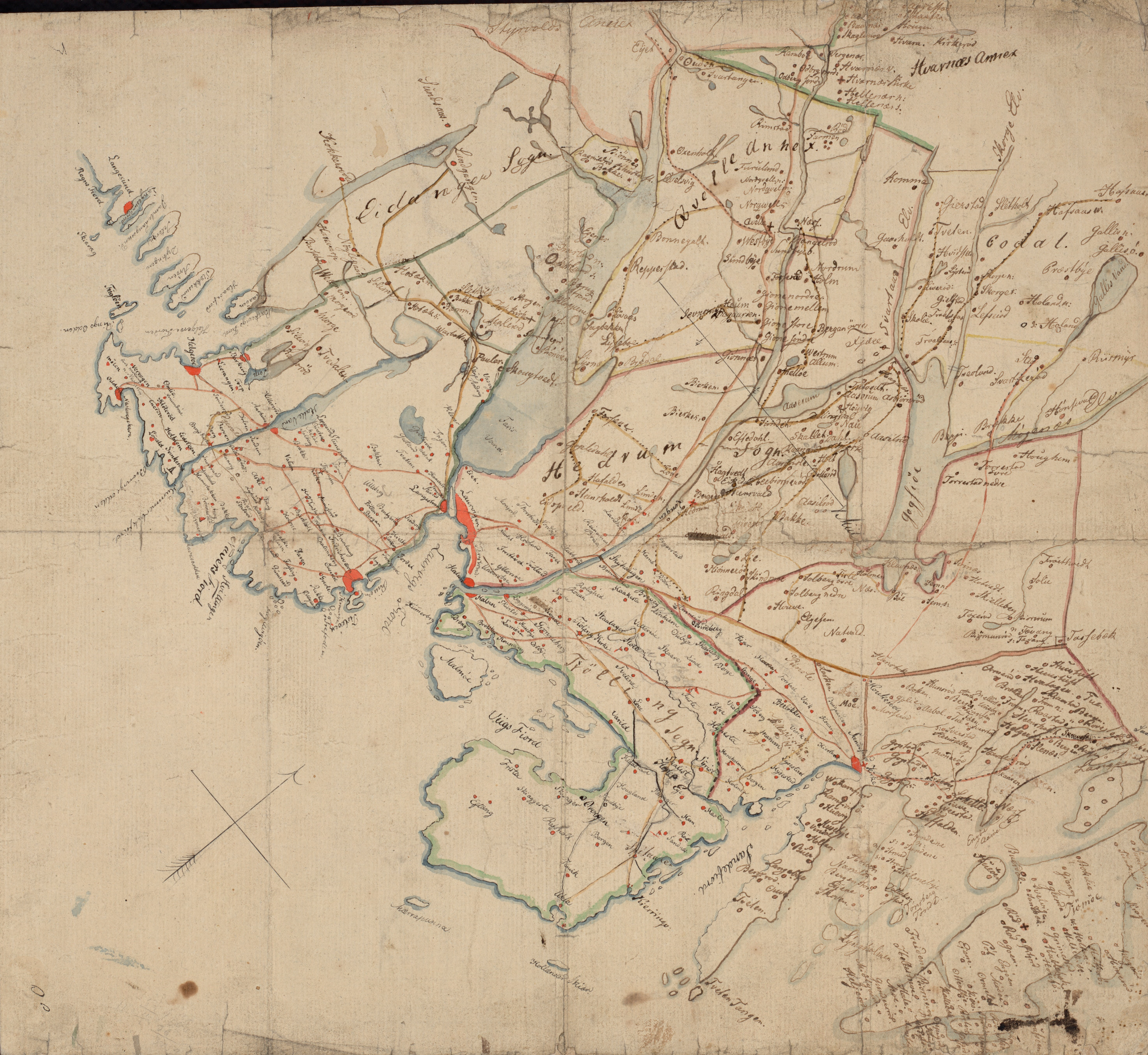 Kart fra Nasjonalbibliotekets kartsamling. Kartet er gitt ut i håndtegnet og viser .